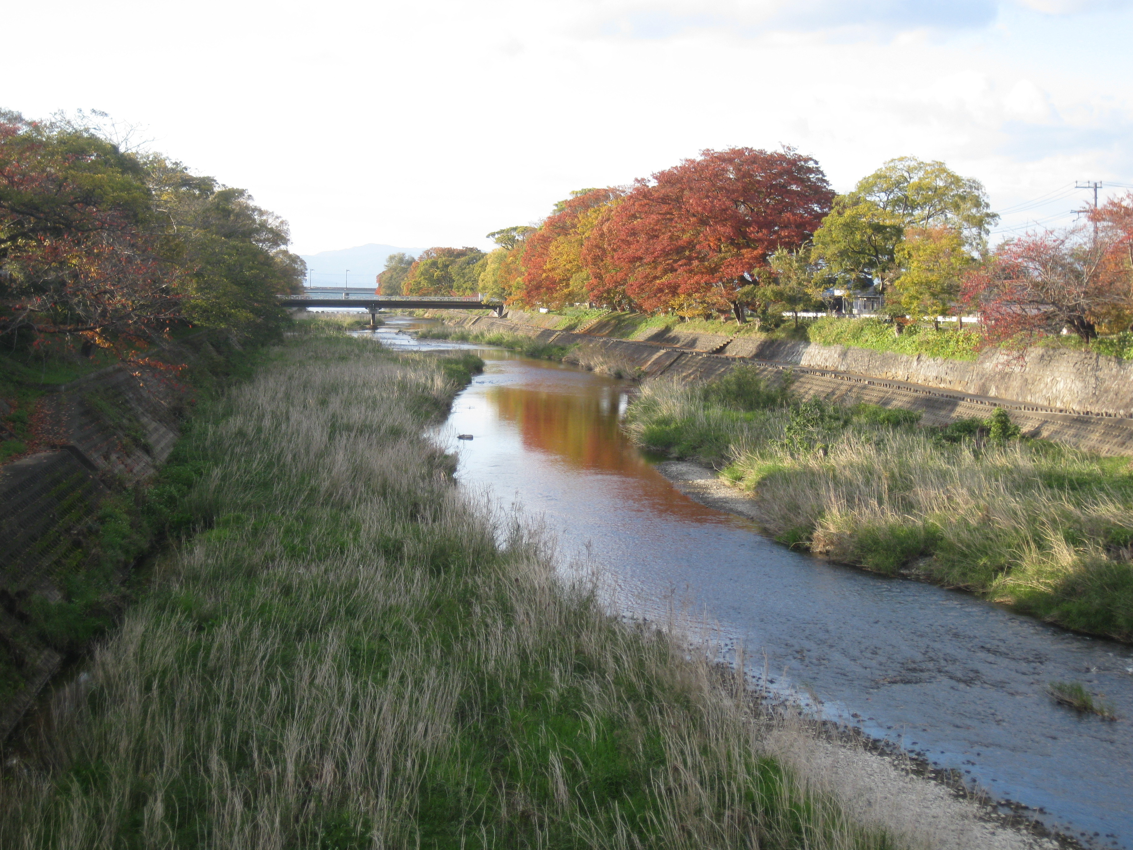 秋の芹川下流域。滋賀県彦根市。